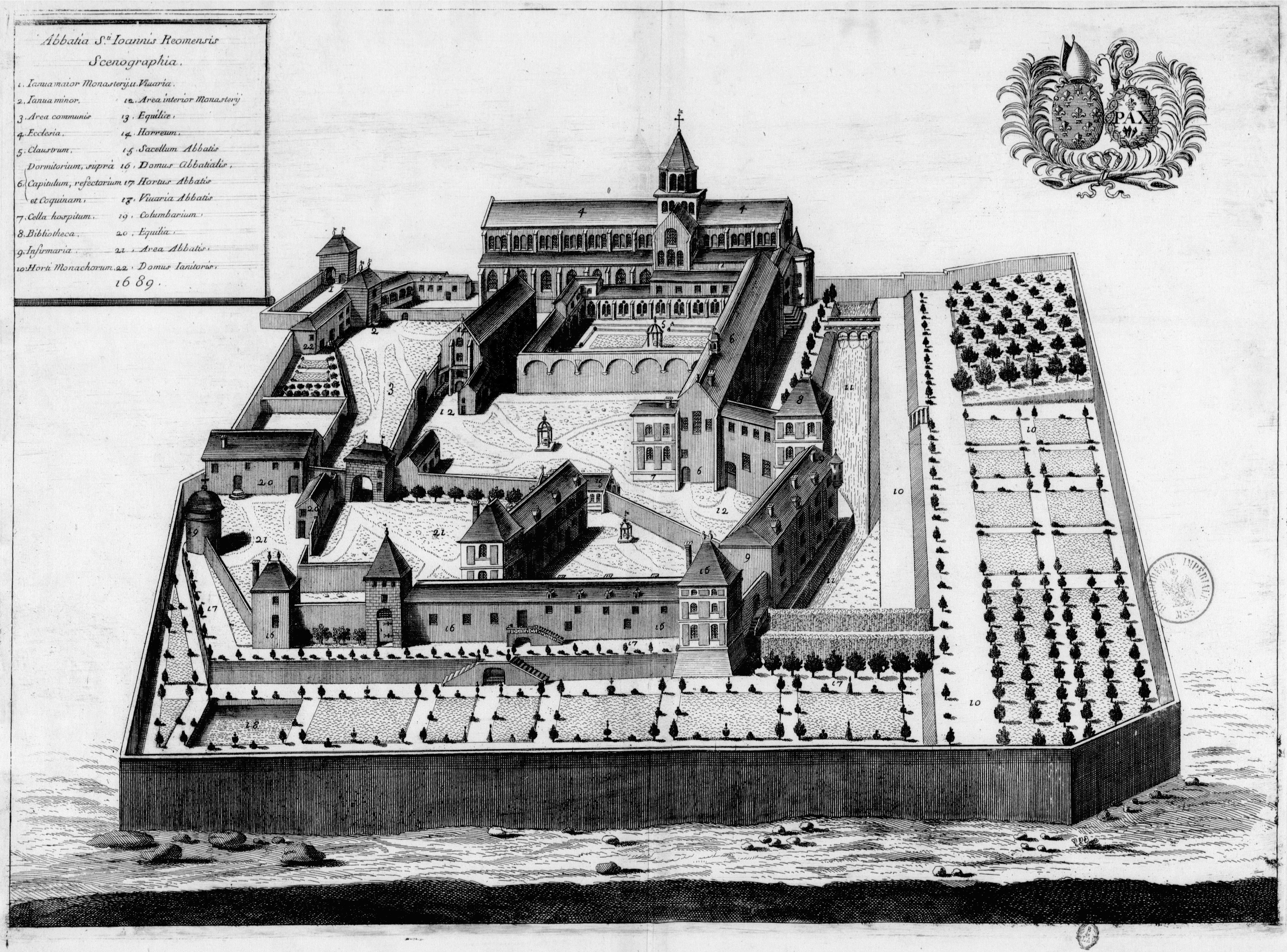 Planche gravée du 17ème siècle représentant l'abbaye Saint-Jean-de-Réome, en France, dans le livre Monasticon Gallicanum.